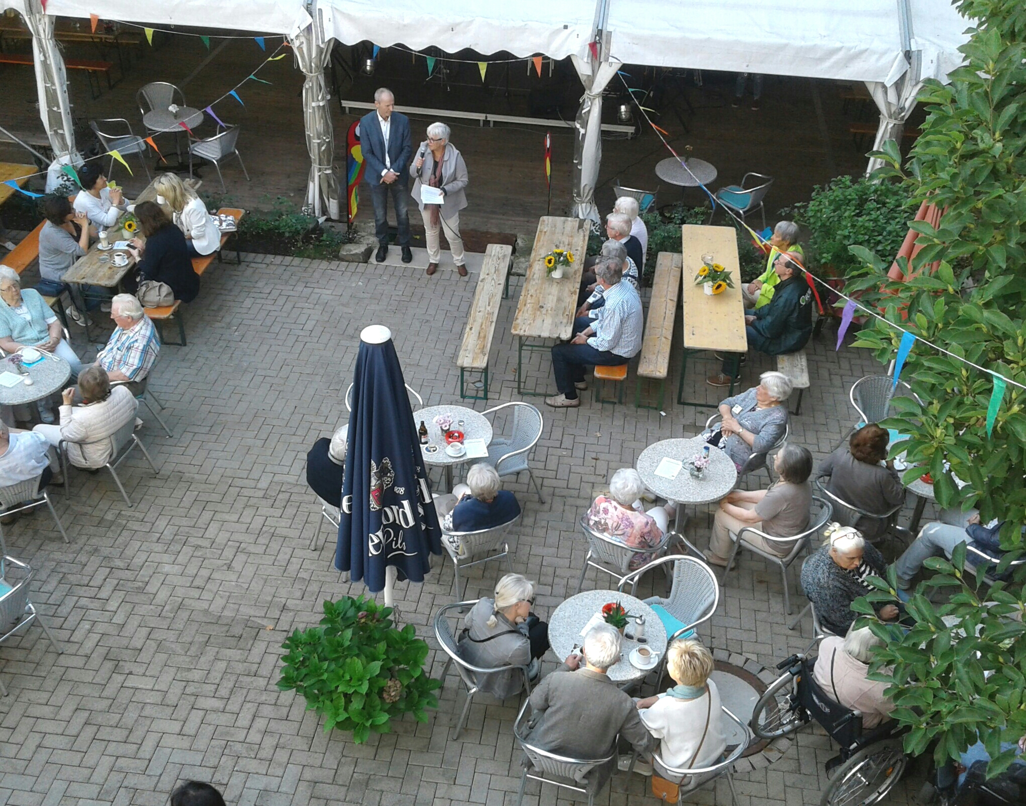 Die Feier zum 40-Jährigen Bestehen des Haus unter den Linden in Herford